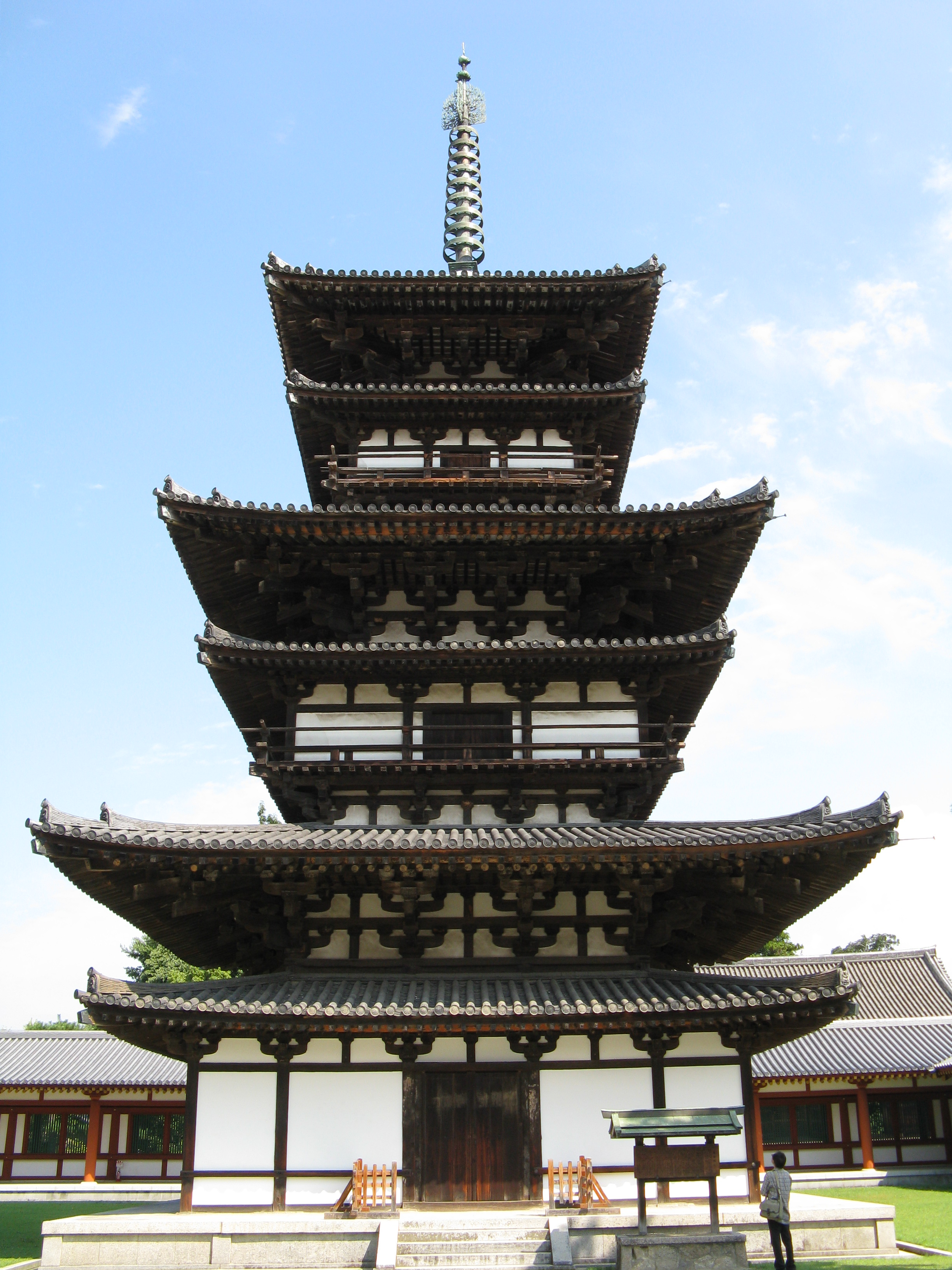 薬師寺 東塔